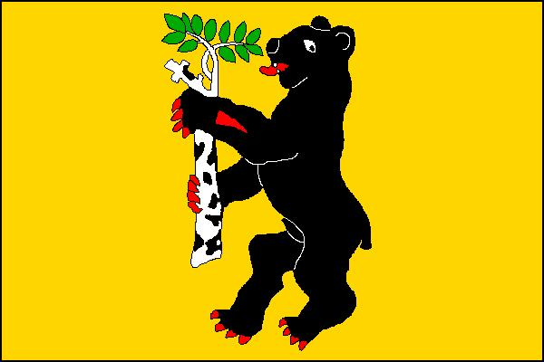 Vlajka obce Hošťalovice